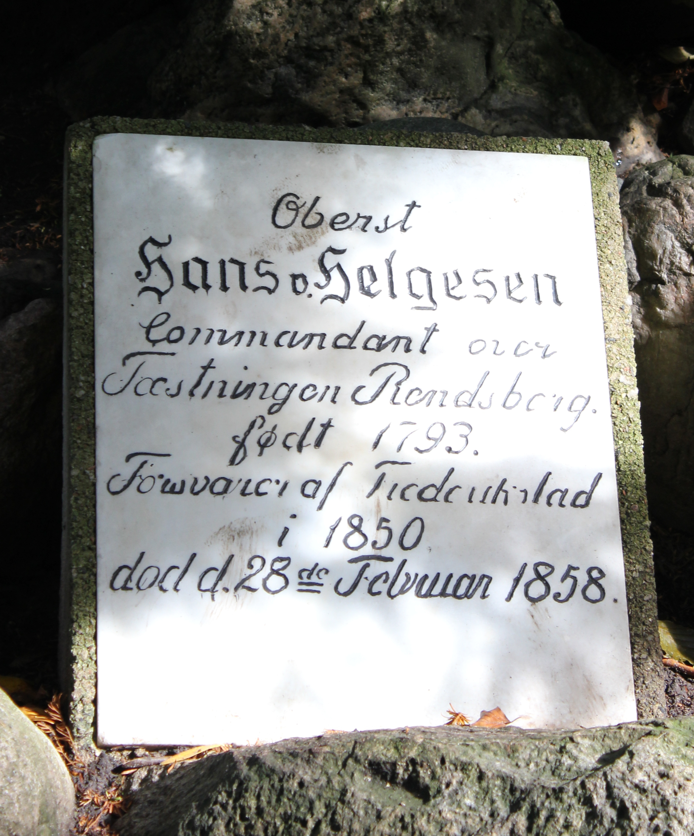 The gravestone of Hans Helgesen on the old cemetery in Flensburg(h), which is opposite of the guarding Flensburg Lion.